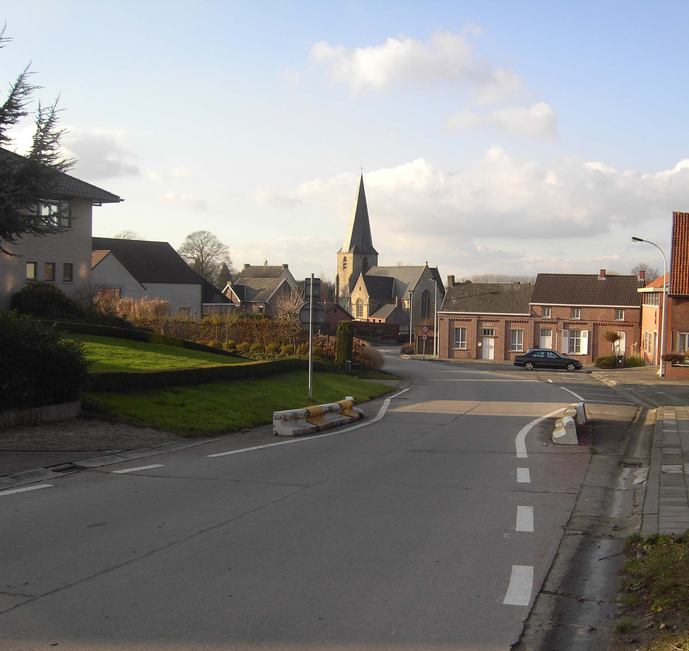 Algemeen zicht op Landskouter - kerk en oud gemeentehuis - Oosterzele - Oost-Vlaanderen - België